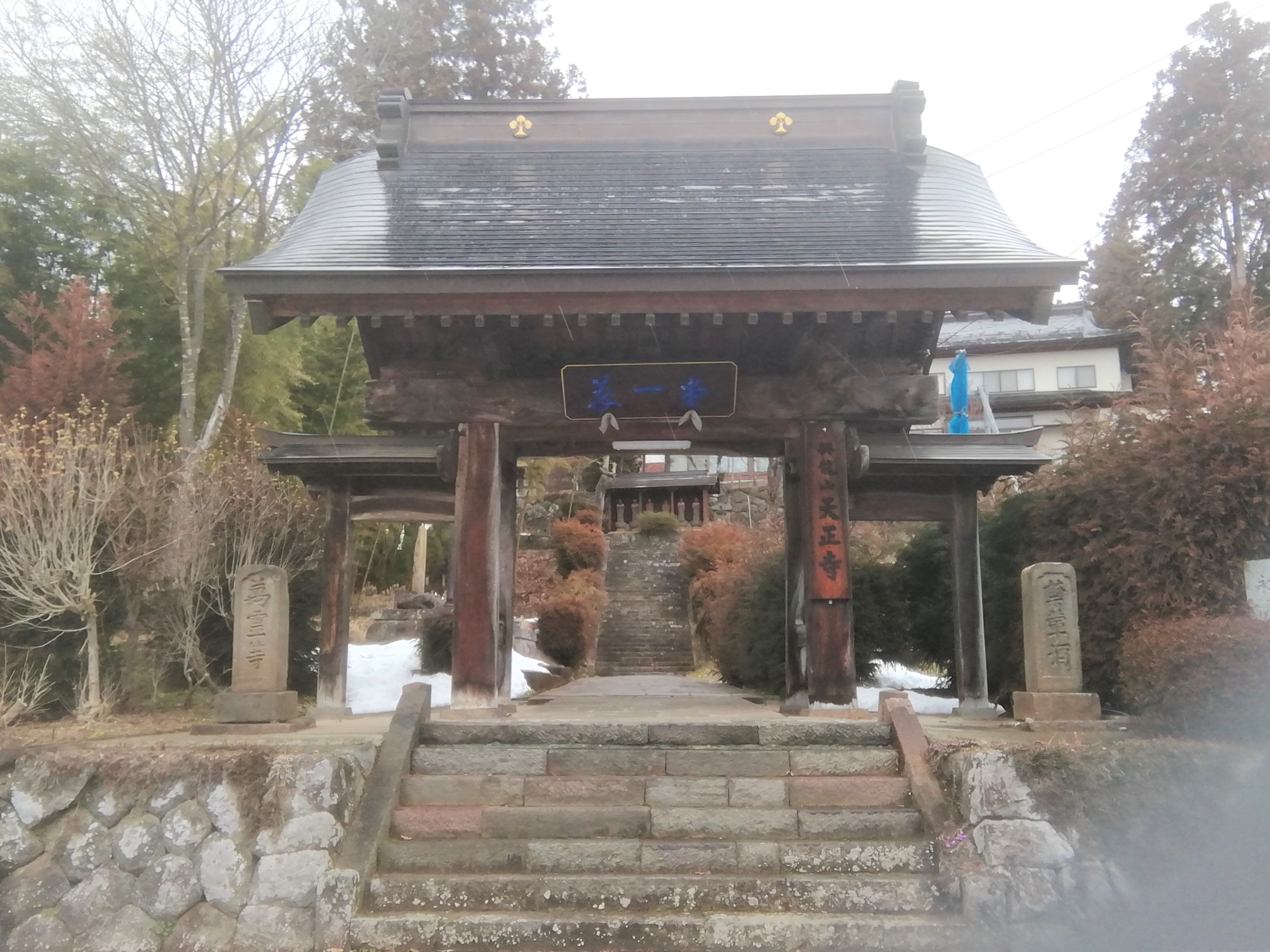 天正寺（2020-2-22）